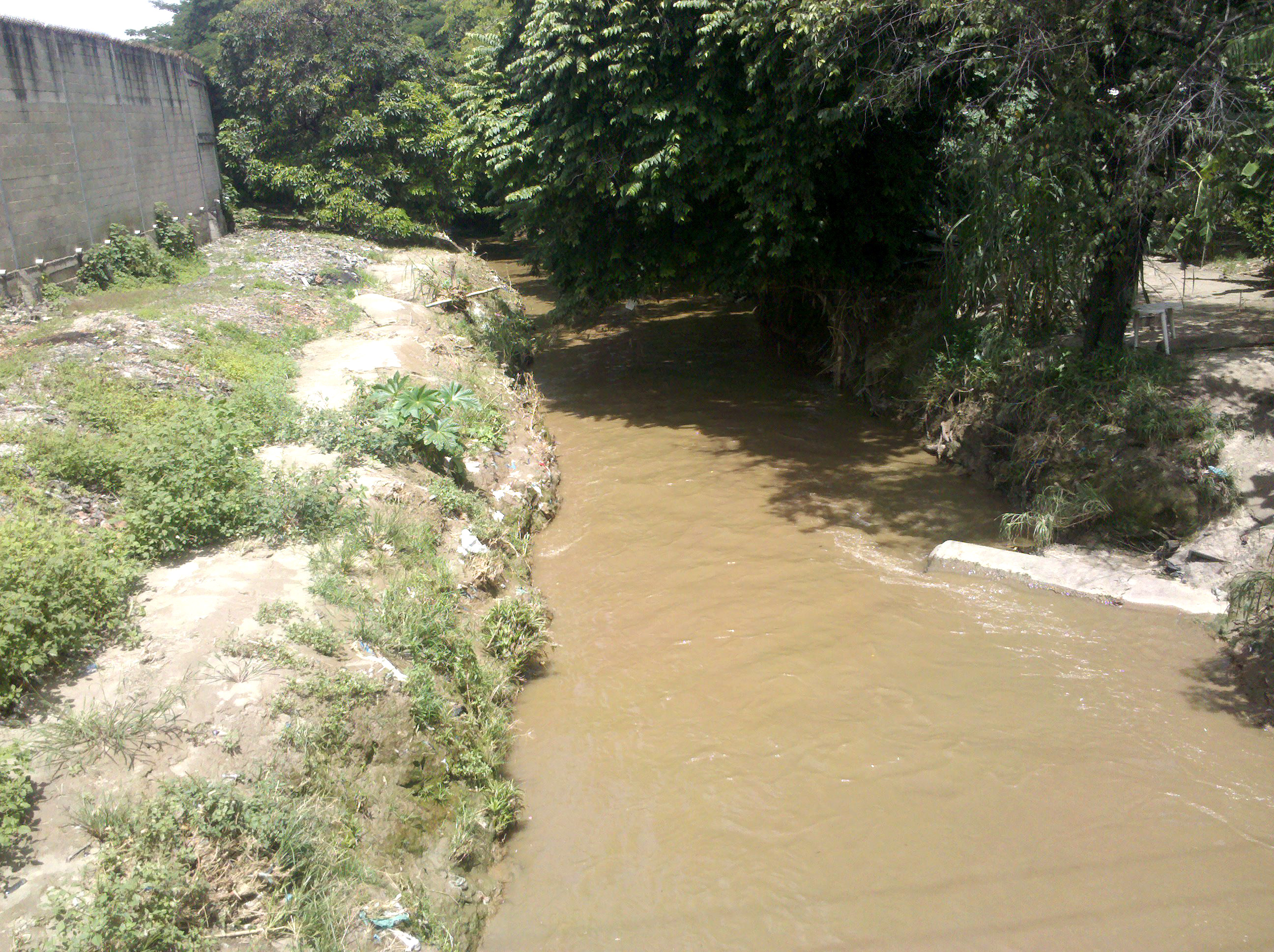 Rio Aragua desde el Puente